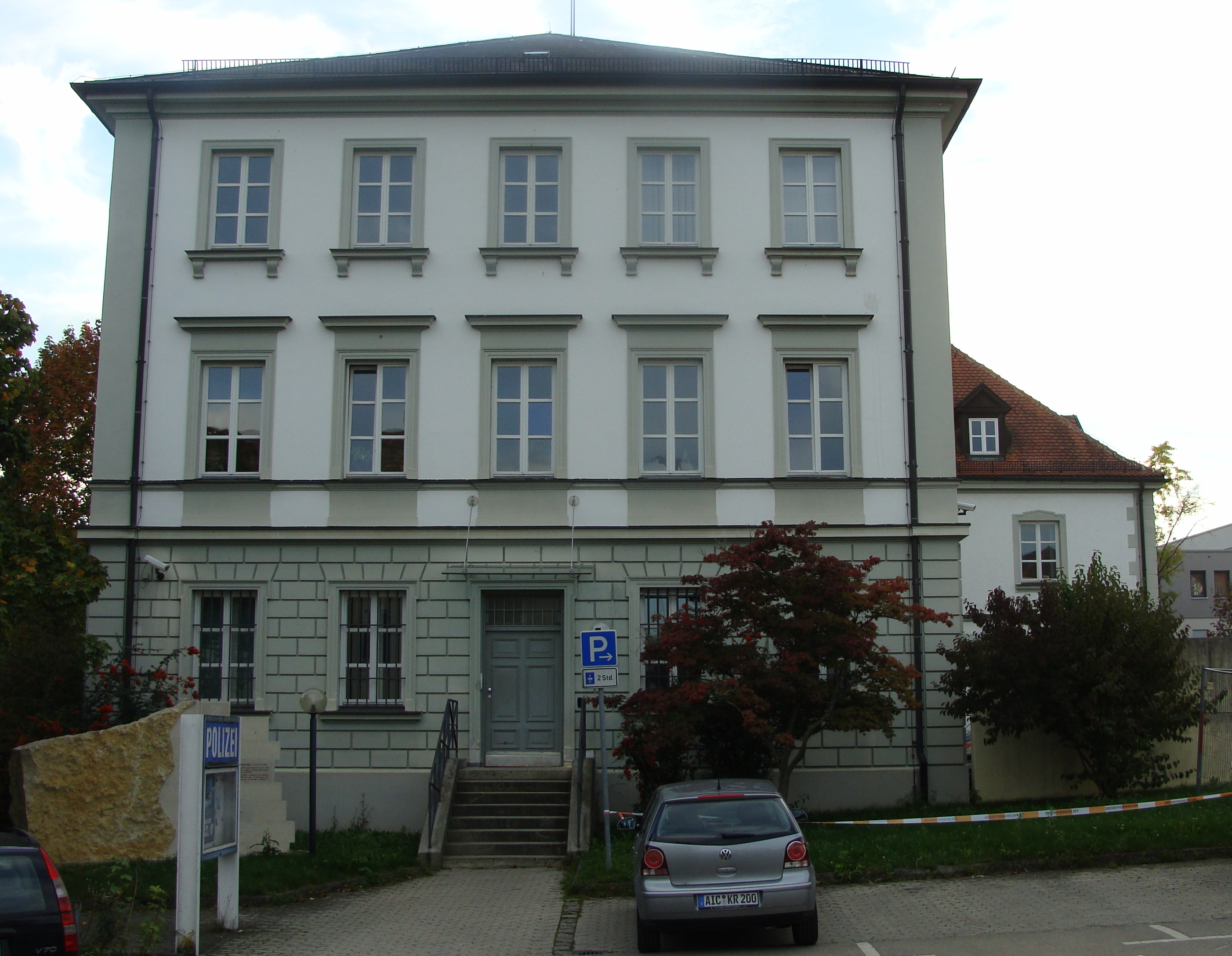 Haagstraße 16This is a photograph of an architectural monument.